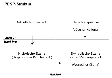 Darstellung des Ablaufes einer Pesso-Struktur